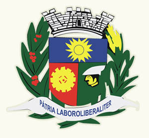 O Brasão de Armas de Mirassolândia, foi criado pela Lei nº. 33, de 07 de Dezembro de 1.962, sendo assim constituído